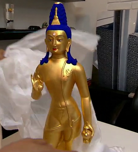 Diese Abbildung zeigt eine Miniaturfigur des Maitreya Buddhas.